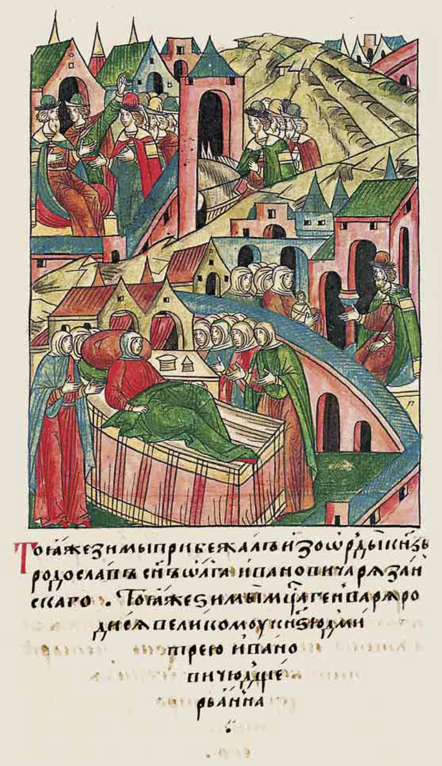 ЛИЦЕВОЙ ЛЕТОПИСНЫЙ СВОД: Той же зимой прибежал из Орды князь Родослав, сын Олега Ивановича Рязанского. Той же зимой, в месяце январе, родилась у великого князя Дмитрия Ивановича дочь Анна.